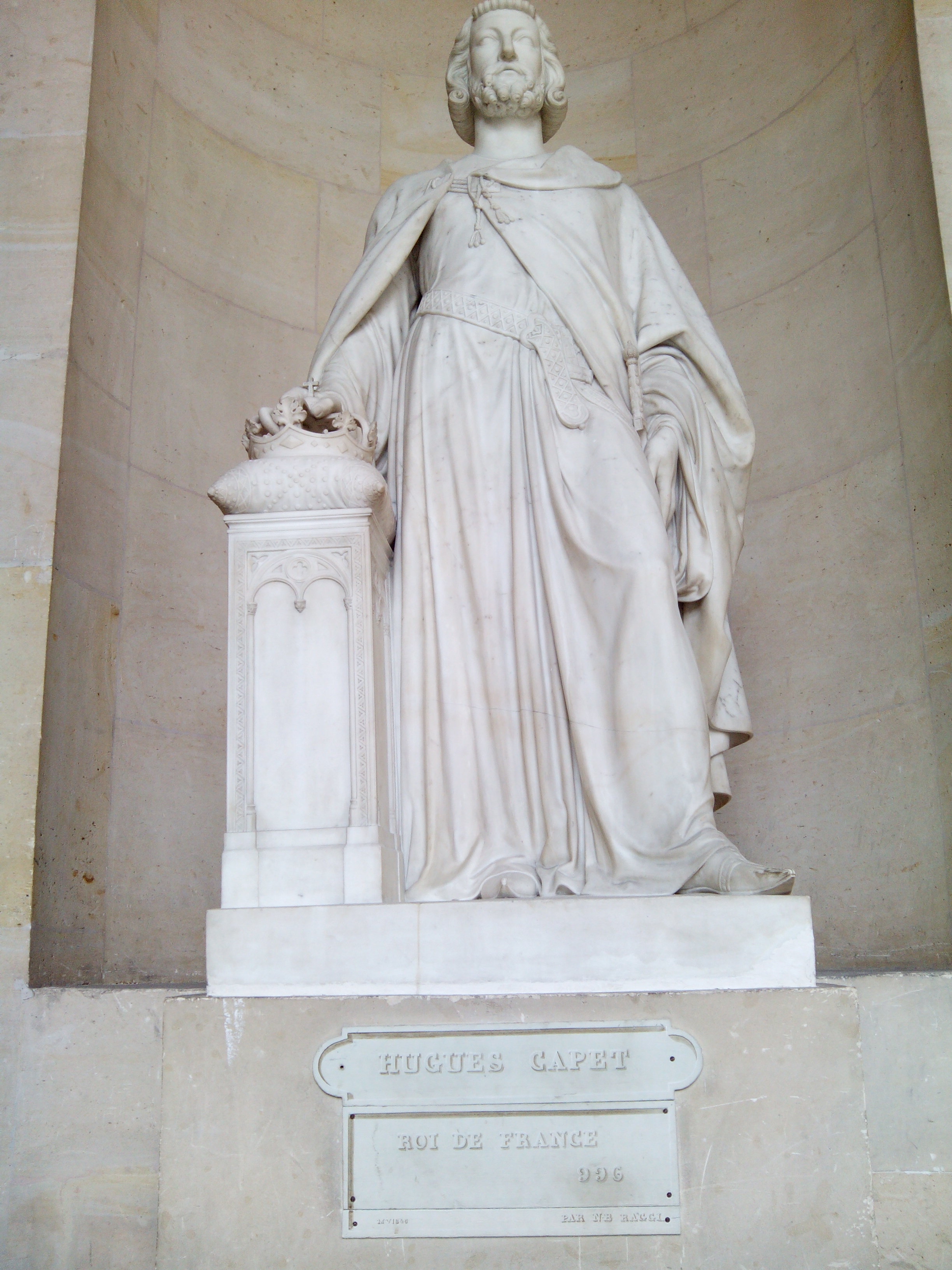 Fotografía realizada en el palacio de Versalles, agosto de 2014